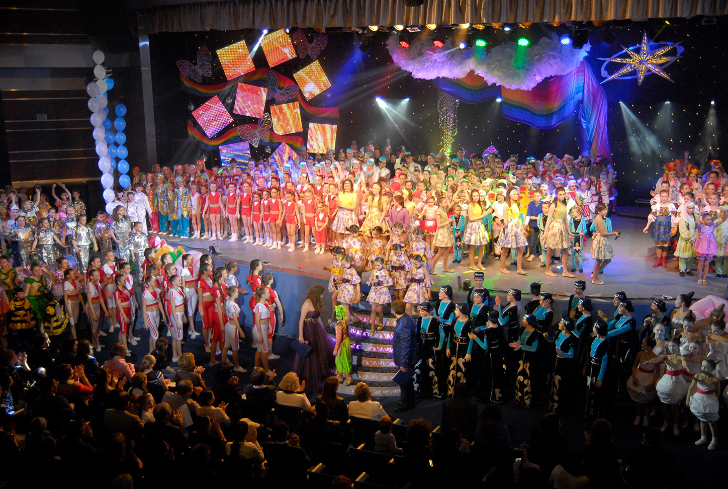 Фотография участников фестиваля Созвездие-Йолдызлык